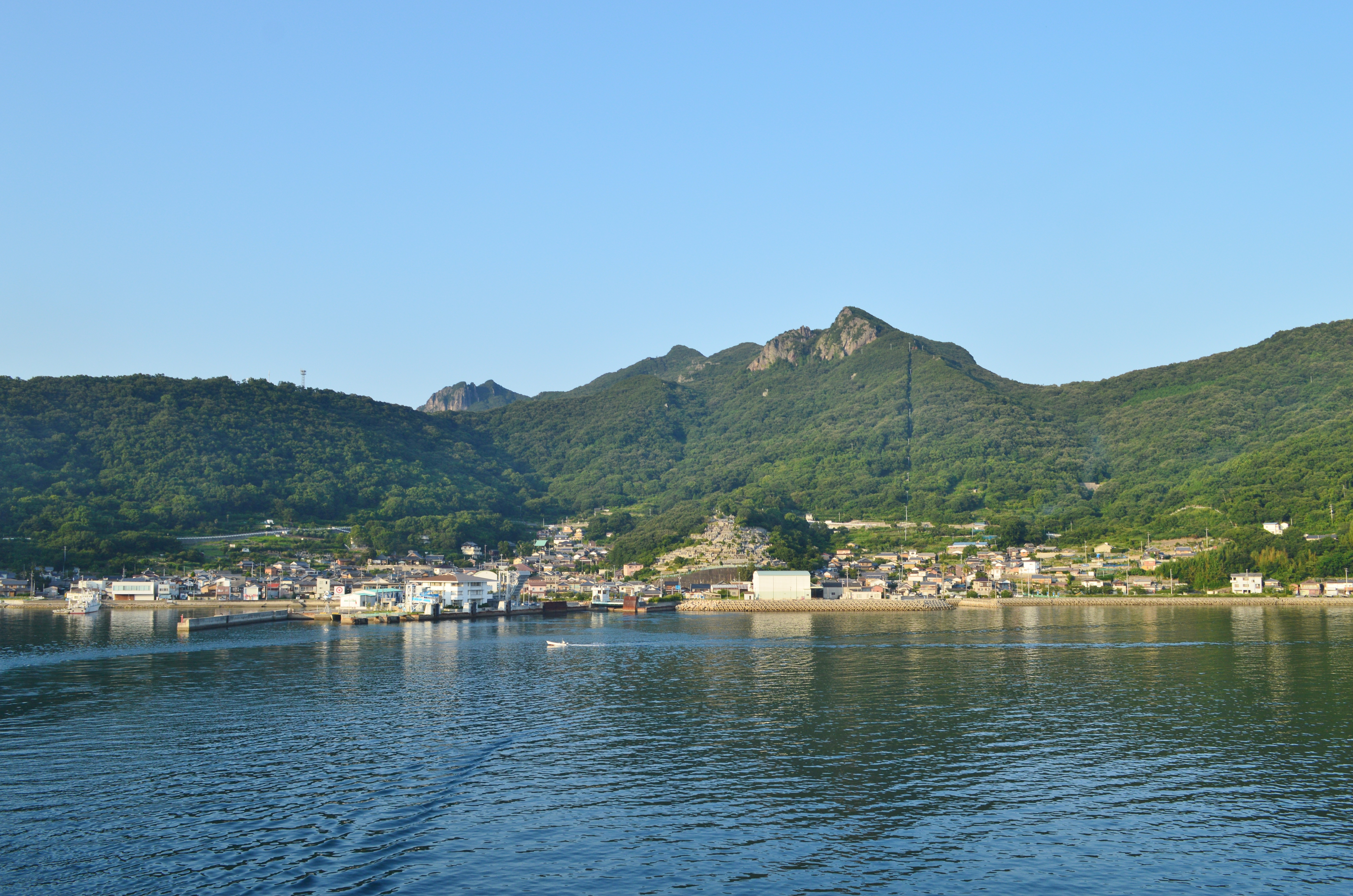 坂手港 全景